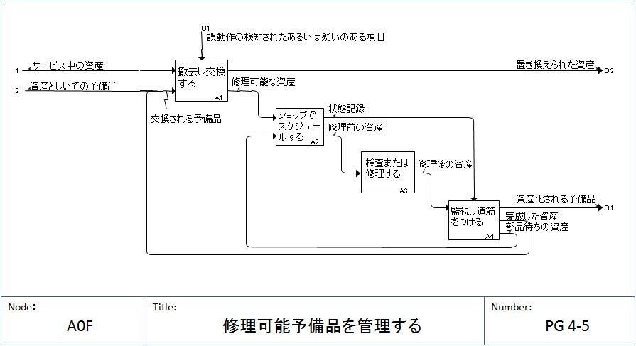 『予備品の維持管理』に関するIDEF0図